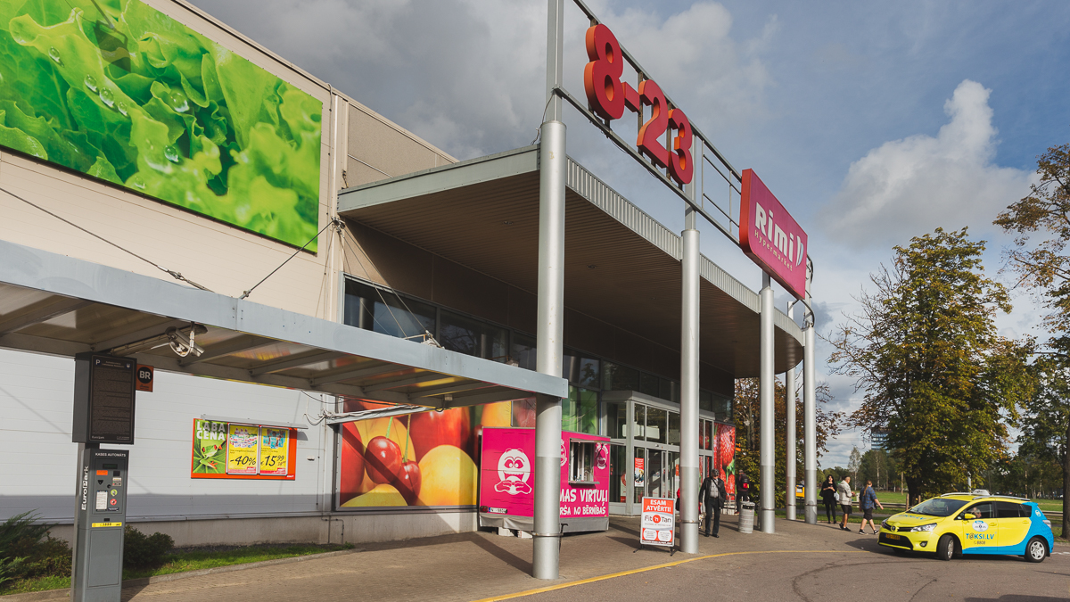 Rimi hipermārkets Pulkveža Brieža ielā